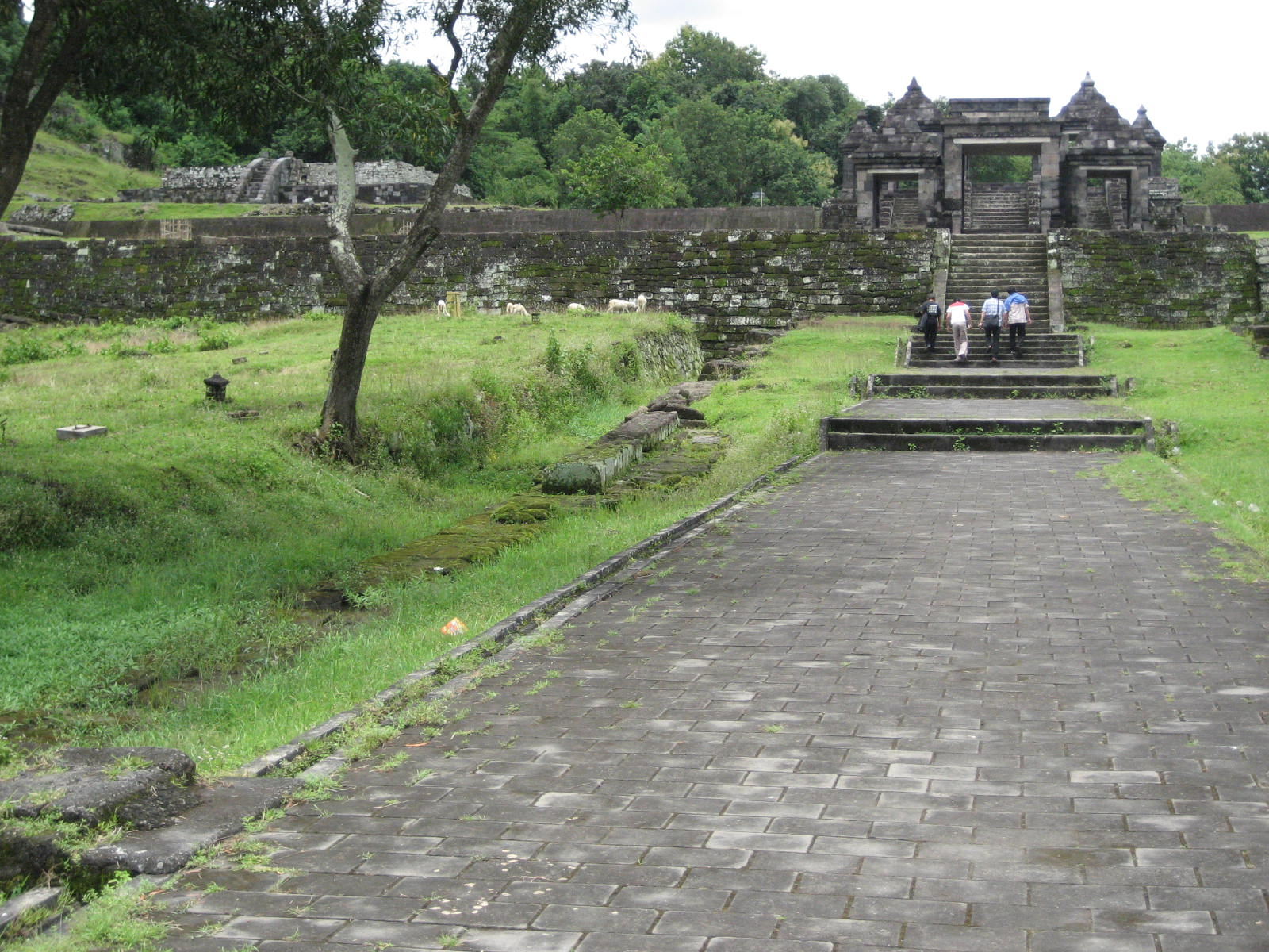 Ratu Boko temple in central Java, Yogyakarta